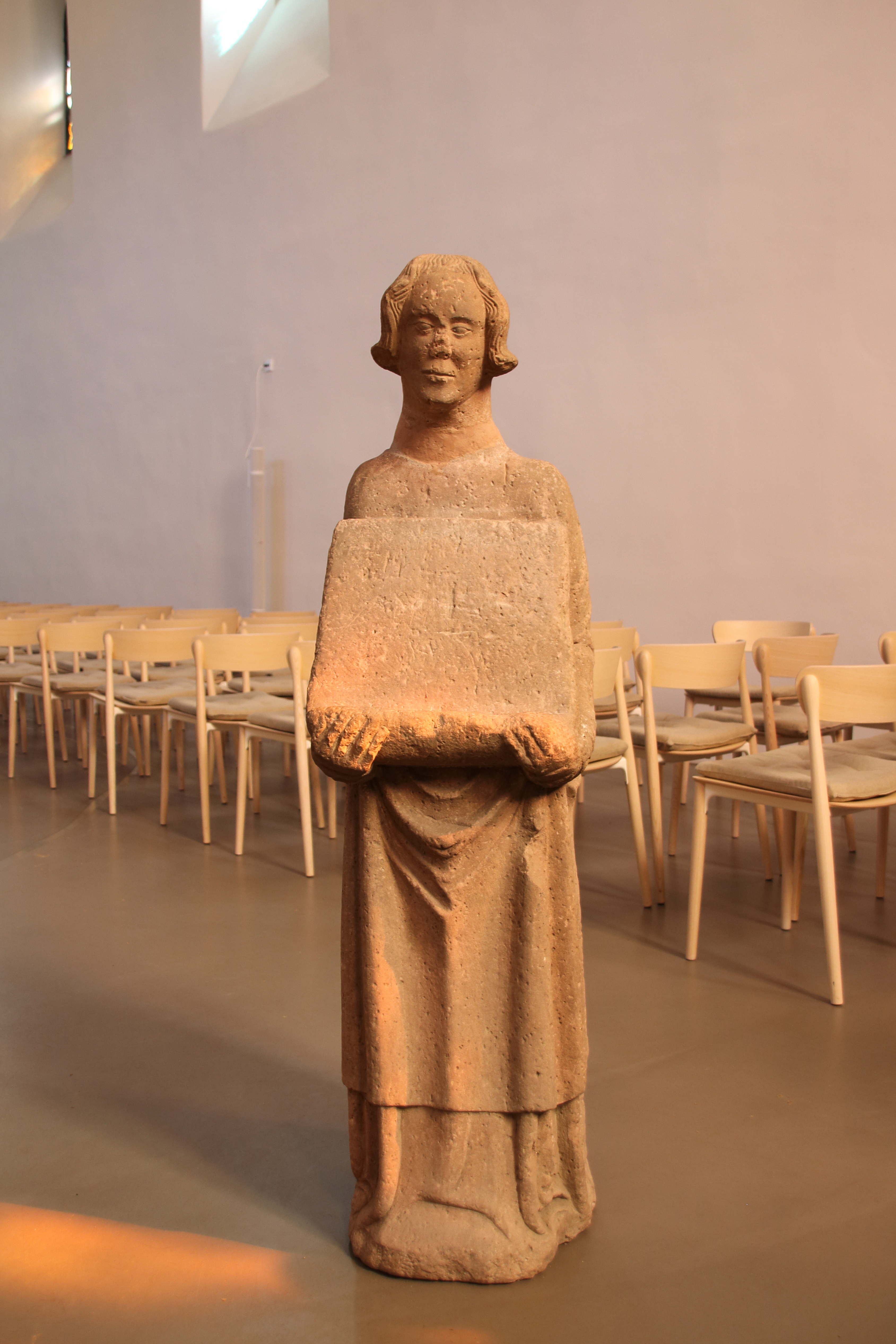 Tragfigur in Form eines sogenannten Atzmanns (auch Pultträger) in der Marienkirche des ehemaligen Klosters Marienhausen in Rüdesheim-Aulhausen. Entstanden um etwa 1450. Höhe 144 cm. Roter Mainsandstein. Im Zuge der Säkularisation kam die Figur zunächst in das Diözesanmuseum Limburg. Zur 825-Jahr-Feier 2014 kehrte sie wieder in die Marienkirche zurück.